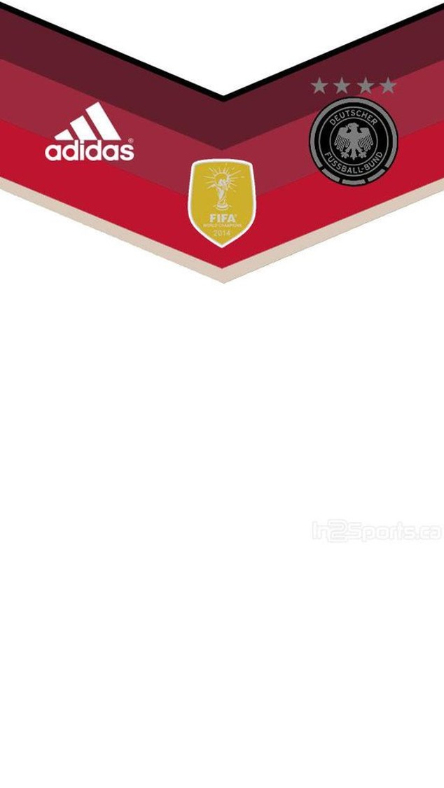 Uniforme De La Seleccion De Alemania 2014 Con El Escudo De Campeon